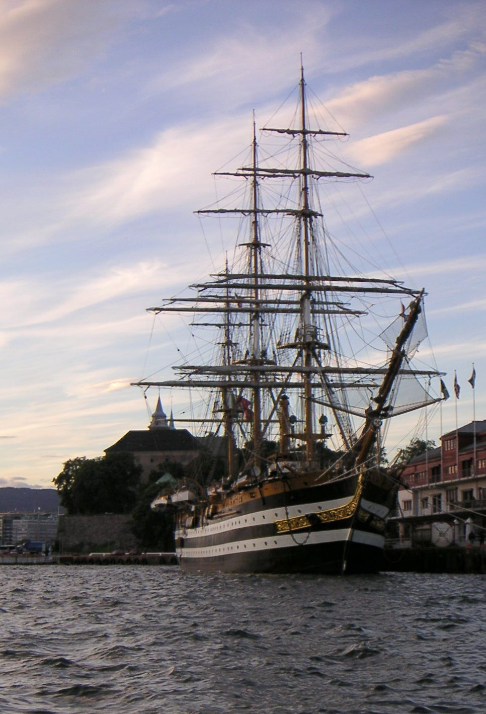 Piękny okrent:D